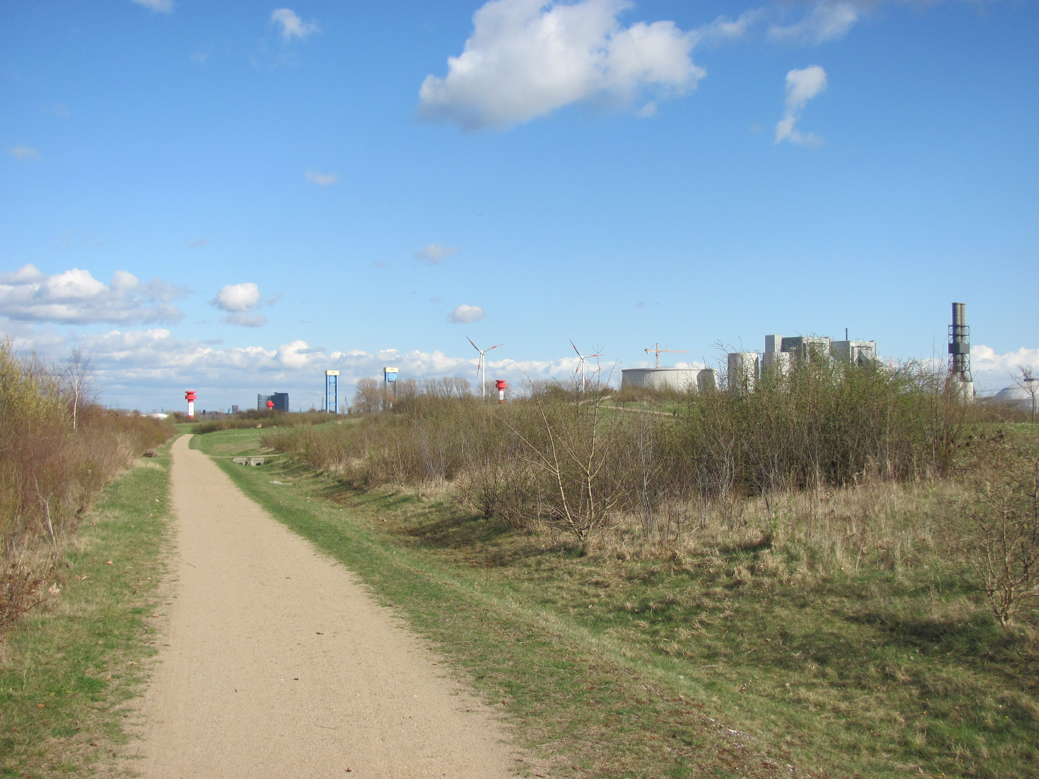 Wanderweg auf der Nordseite des Moorburger Berges in Hamburg, im Hintergrund die Endportale der Kattwyk-Brücke und rechts das Kohlekraftwerk Moorburg